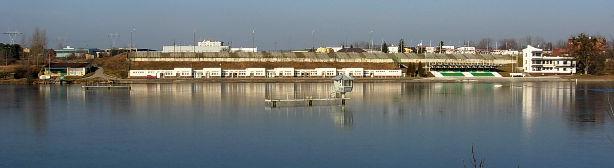 Tor regatowy w Brdyujściu w Bydgoszczy